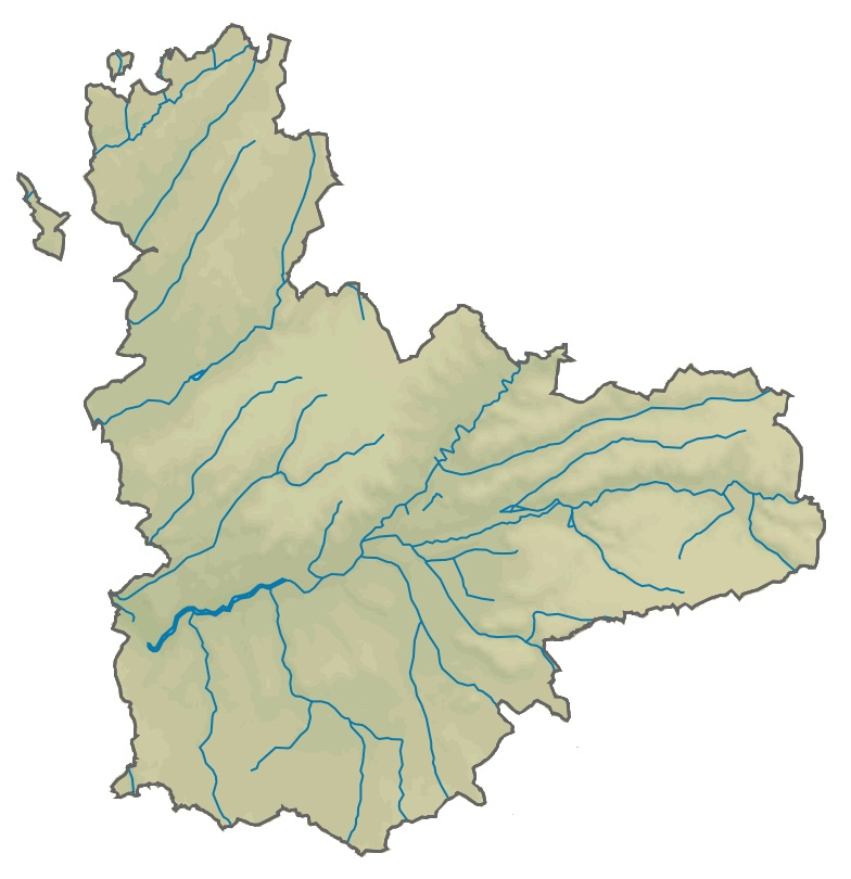 Mapa de la provincia de la provincia de Valladolid, Castilla y León, España.